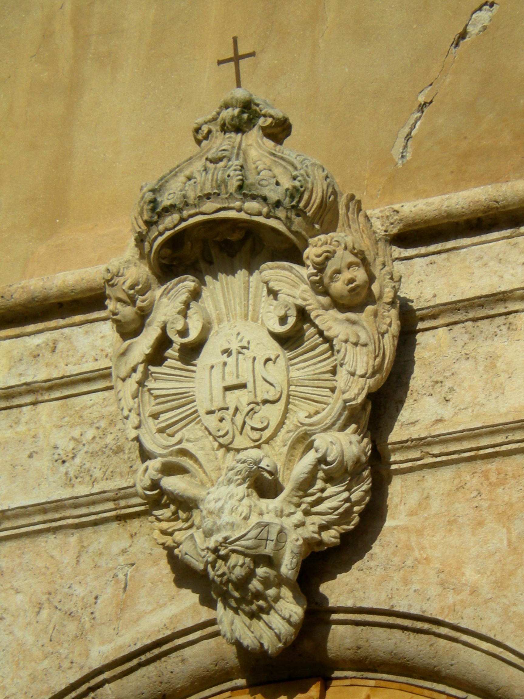 Porta Bazzano (L'Aquila): particolare dello stemma